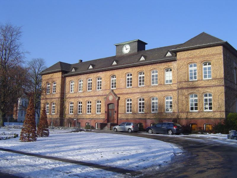 Westfälische Klinik für Psychiatrie Aplerbeck